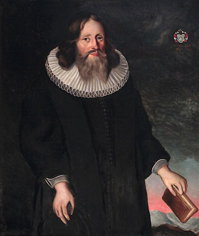 Colbjørn Torstensen Arneberg 1900, olje på lerret